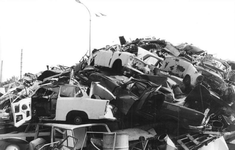 ADN-Peer Grimm 31.7.90 Berlin: Schrott - So enden die "Volkswagen" aus der DDR-Produktion. Für viele Trabbis ist die Halde in der Metallaufbereitung Berlin GmbH letzter Standort, bevor sie verschrottet werden. Für durchschnittlich 100,--DM kann man sein früheres Statussymbol hier "aufbereiten" lassen. Ca. dreimal soviel Autos wie früher werden jetzt hier abgeliefert, täglich etwa 40 Tonnen zu kleinen Paketen gepreßt. Problem: Kaum noch Abnehmer, da auch das Stahlwerk Brandenburg Schrott zur Weiterverarbeitung seit 6 Wochen nicht mehr annimmt.